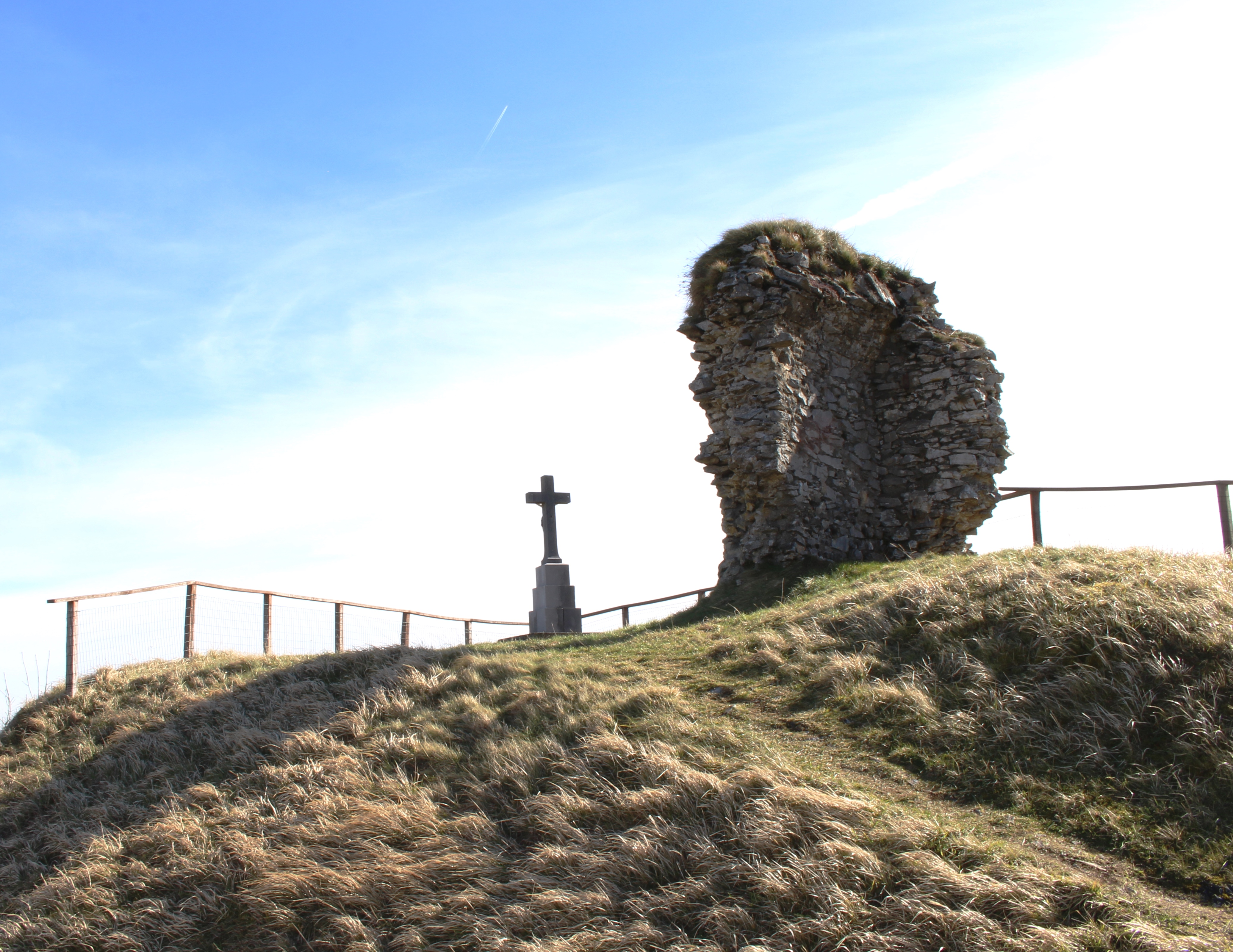 Château de Labassère (Hautes-Pyrénées)